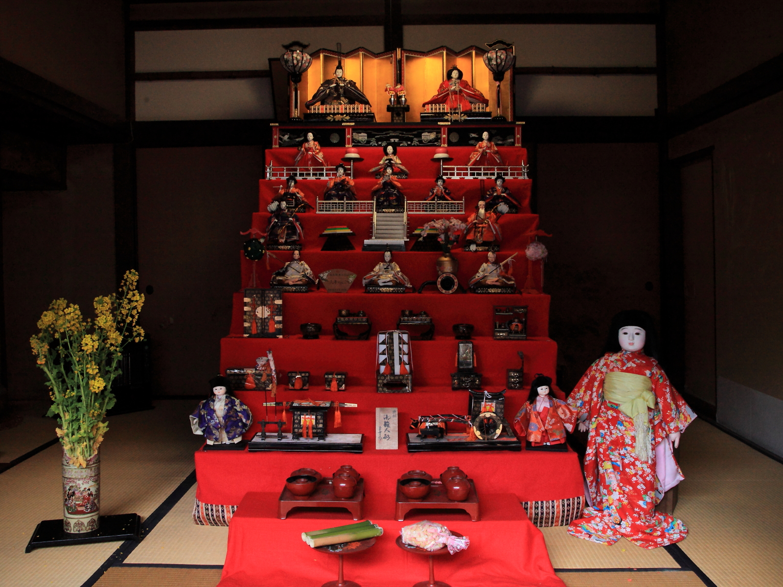 かゑで加東家のおひなさん（豊田市足助町、2012年）